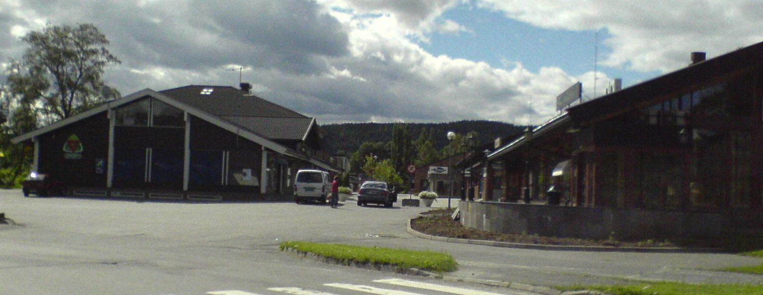 Bilde_av_Bjørkelangen_stasjon